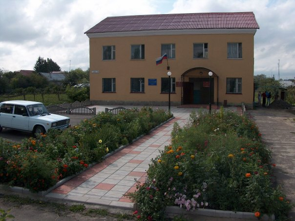 Хотынецкая поселковая администрация